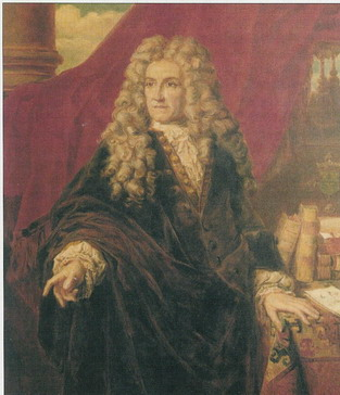 Jean de Brouchoven, 2em Comte de Bergeyck, 1er Baron de Leefdael